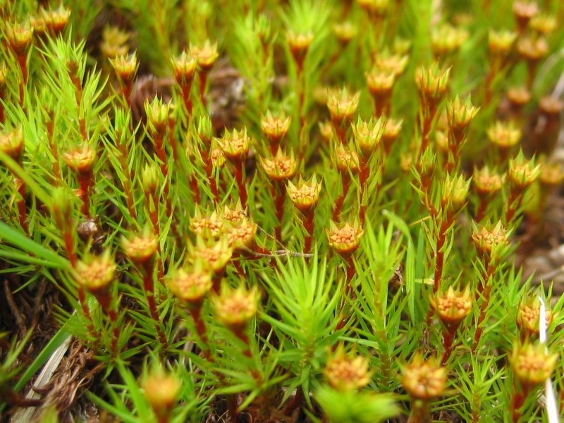 Steifblättriges Widertonmoos (Polytrichum strictum), Zingst